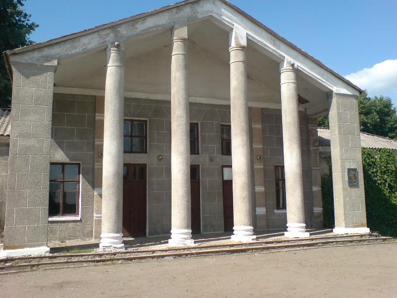 Будинок Культури с.Заплавка